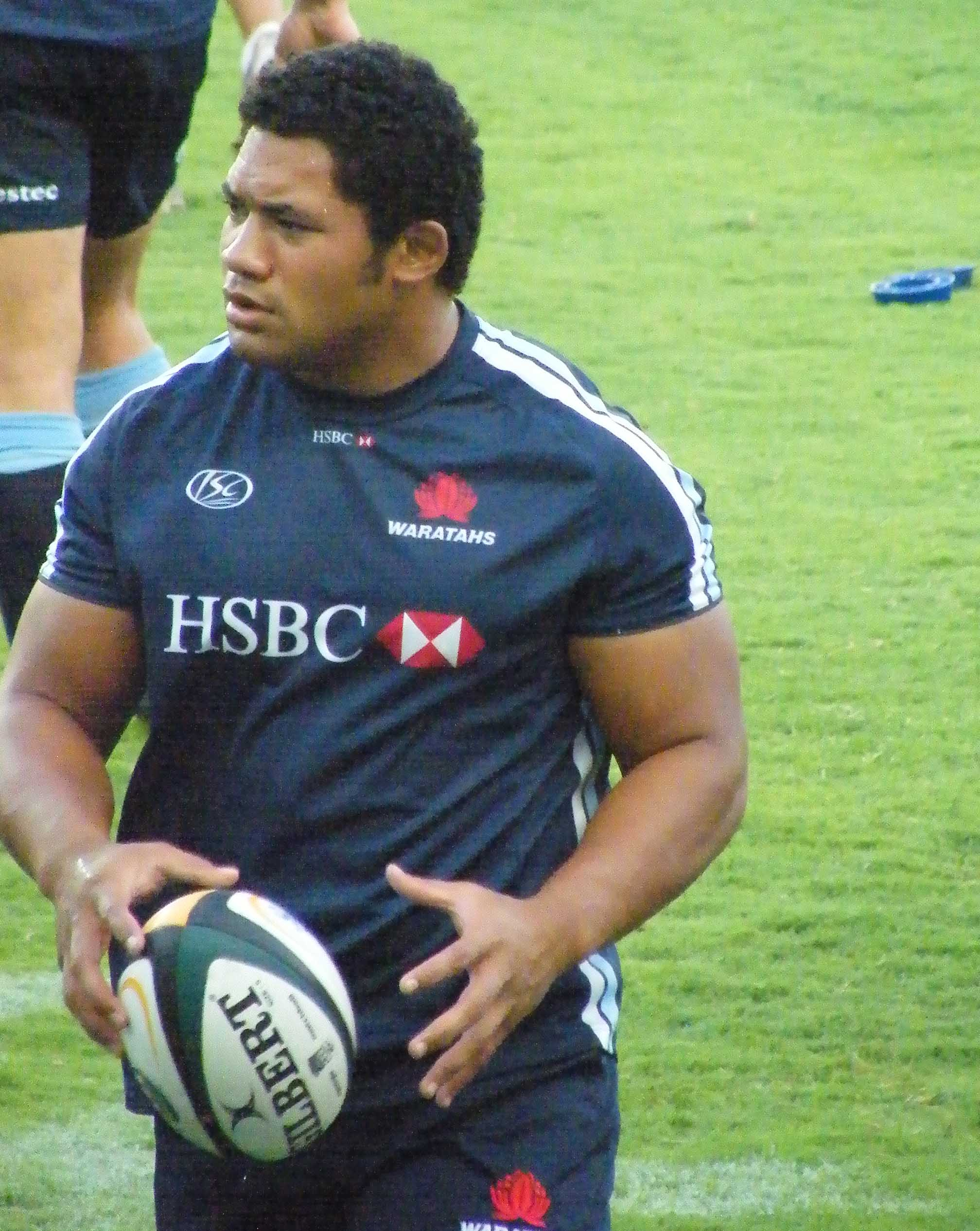 NSW Waratahs hooker Tatafu Polota-Nau